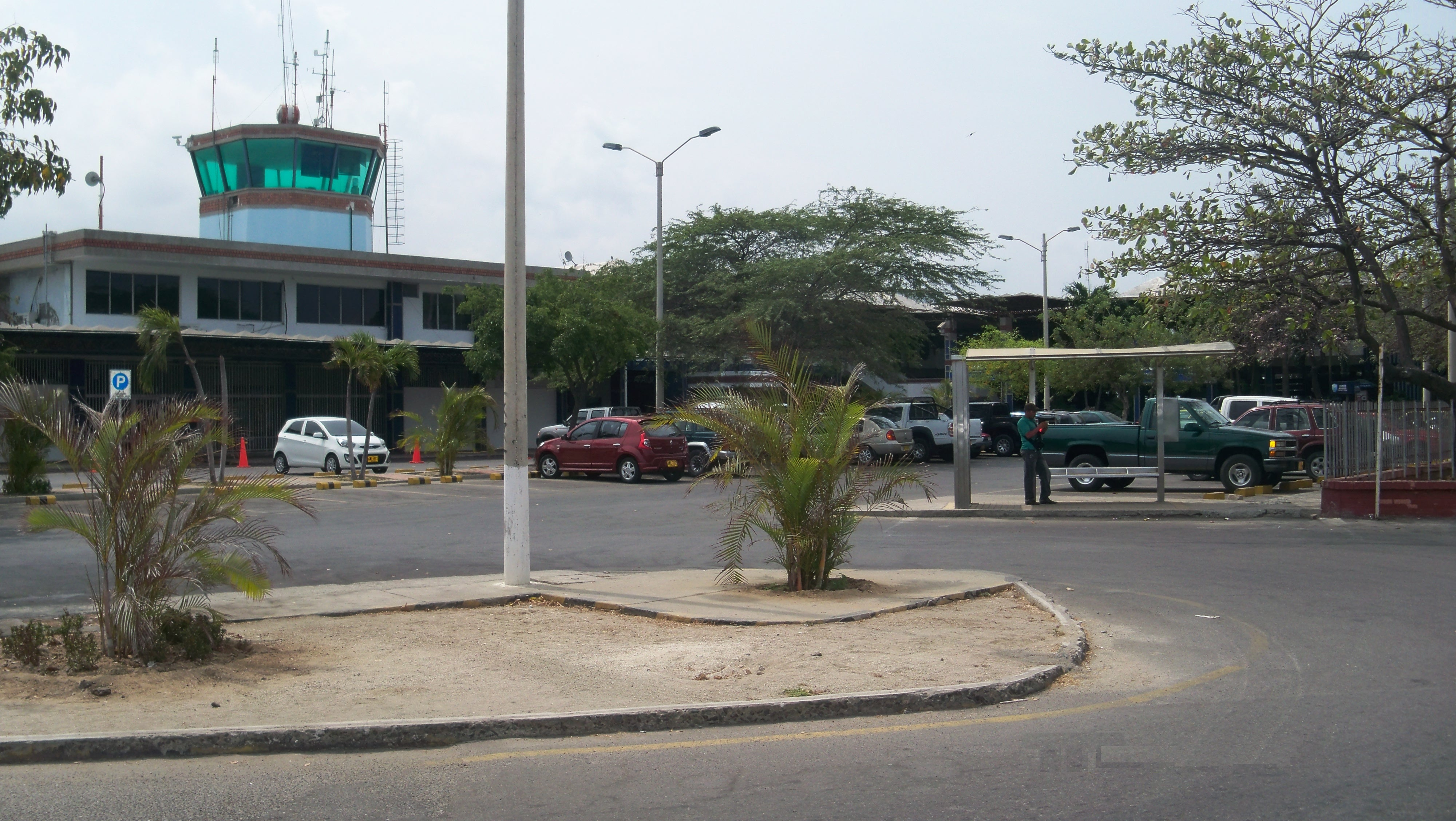 Aeropuerto Internacional Simón Bolívar de Santa Marta Colombia